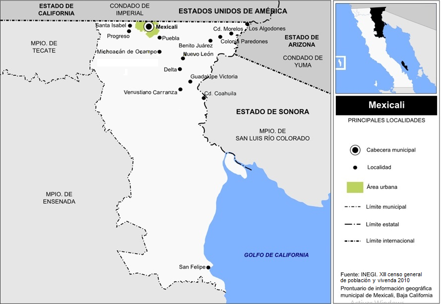 En este croquis o mapa esquemático sin escala, se encuentran las principales localidades del municipio de Mexicali, se encuentra editado a partir del original hecho por Battroid, ya que aquel contenía algunos errores en la nomenclatura de los localidades, uno de los principales era un error originado en el conteo de población 2005 del INEGI, en el cual.se designaba a Venustiano Carranza como Alberto Oviedo Mota, el cual es un ejido existente y cuyo núcleo de población está integrado o conurbado con Venustiano Carranza, sin embargo, este último es el nombre oficial y tradicional del poblado. También se localizaba anteriormente Ciudad Coahuila o Estación Coahuila de modo incorrecto, donde en realidad se encuentra Nuevo León y por último se señalaba como Cerro Prieto a Michoacán de Ocampo.